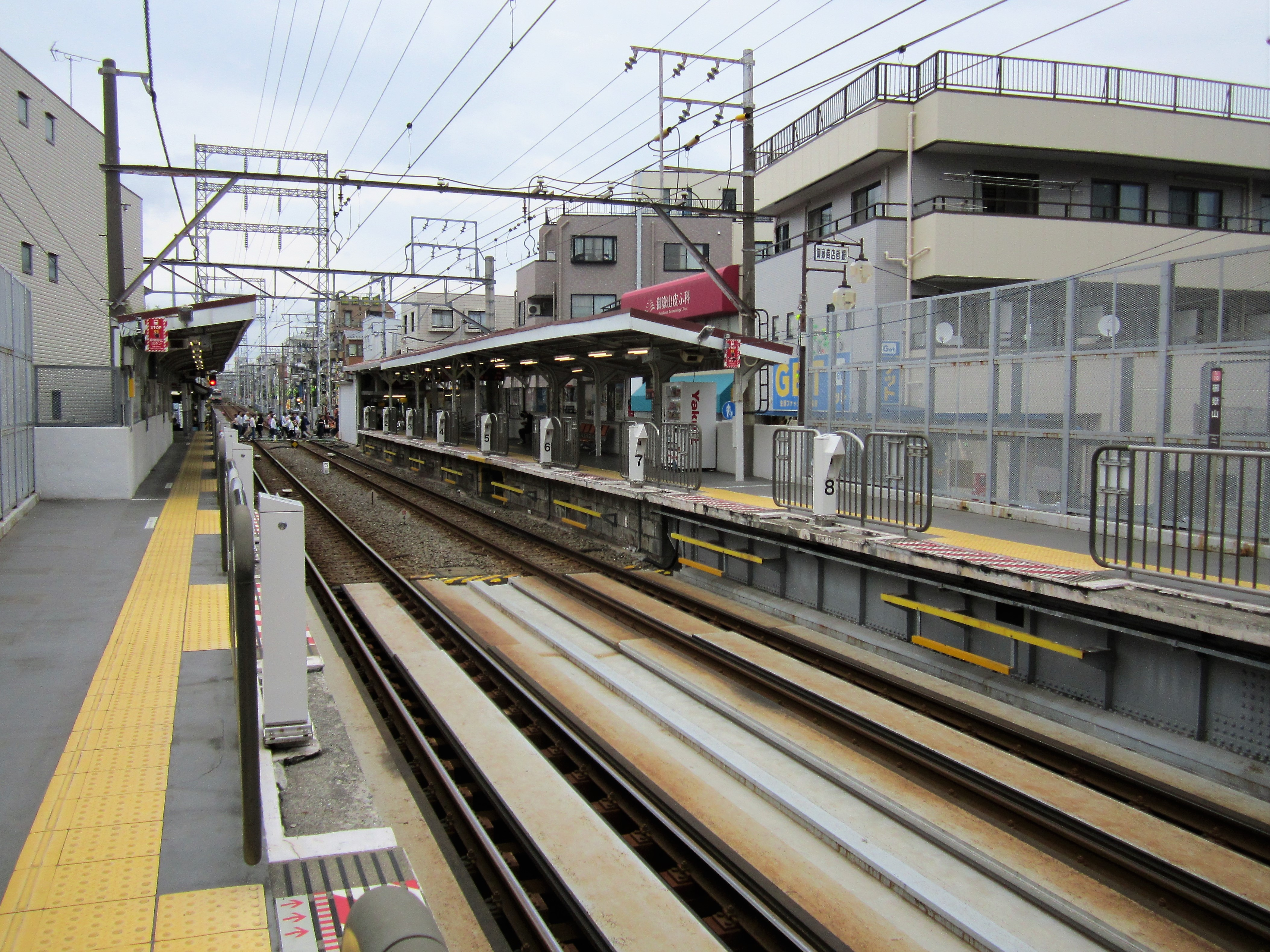 御嶽山駅ホーム